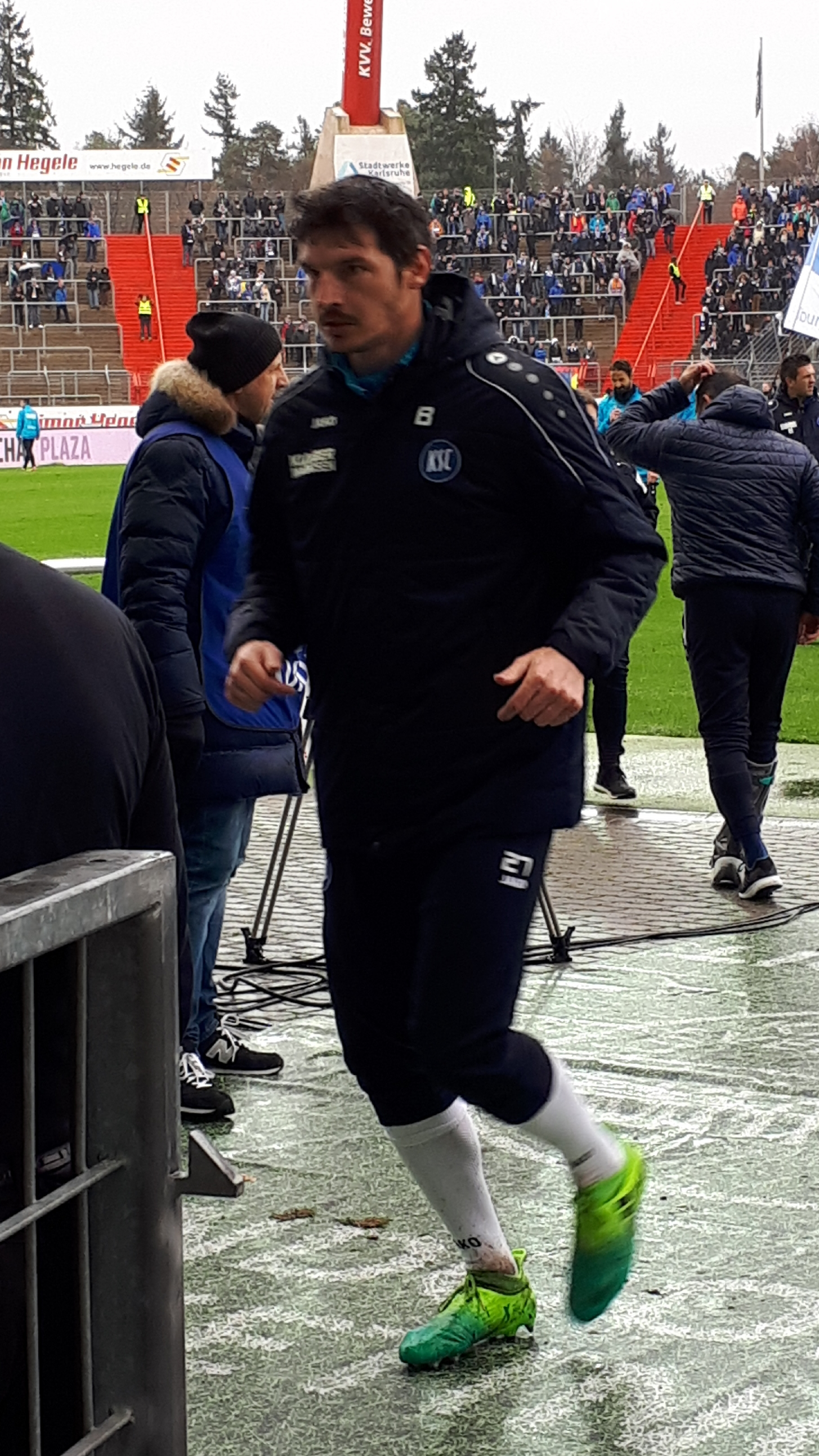 Fußballspieler Dominik Stroh-Engel beim Heimspiel des Karlsruher SC gegen die SpVgg Unterhaching am 20. Januar 2018.